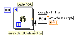 Programa en Labview Imagen creada por el usuario Murphy sujeta a las condiciones de la licencia GFDL.